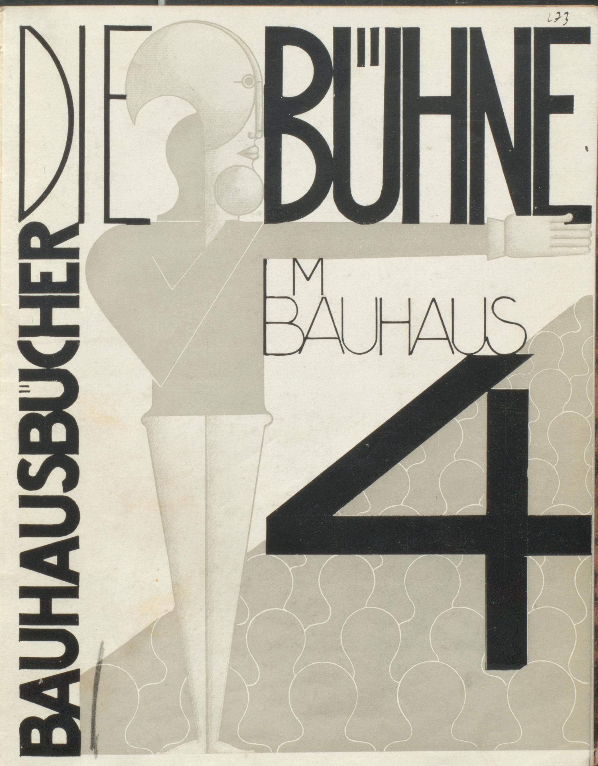 Bauhausbücher 4 Die Bühne im Bauhaus 1925 Einband